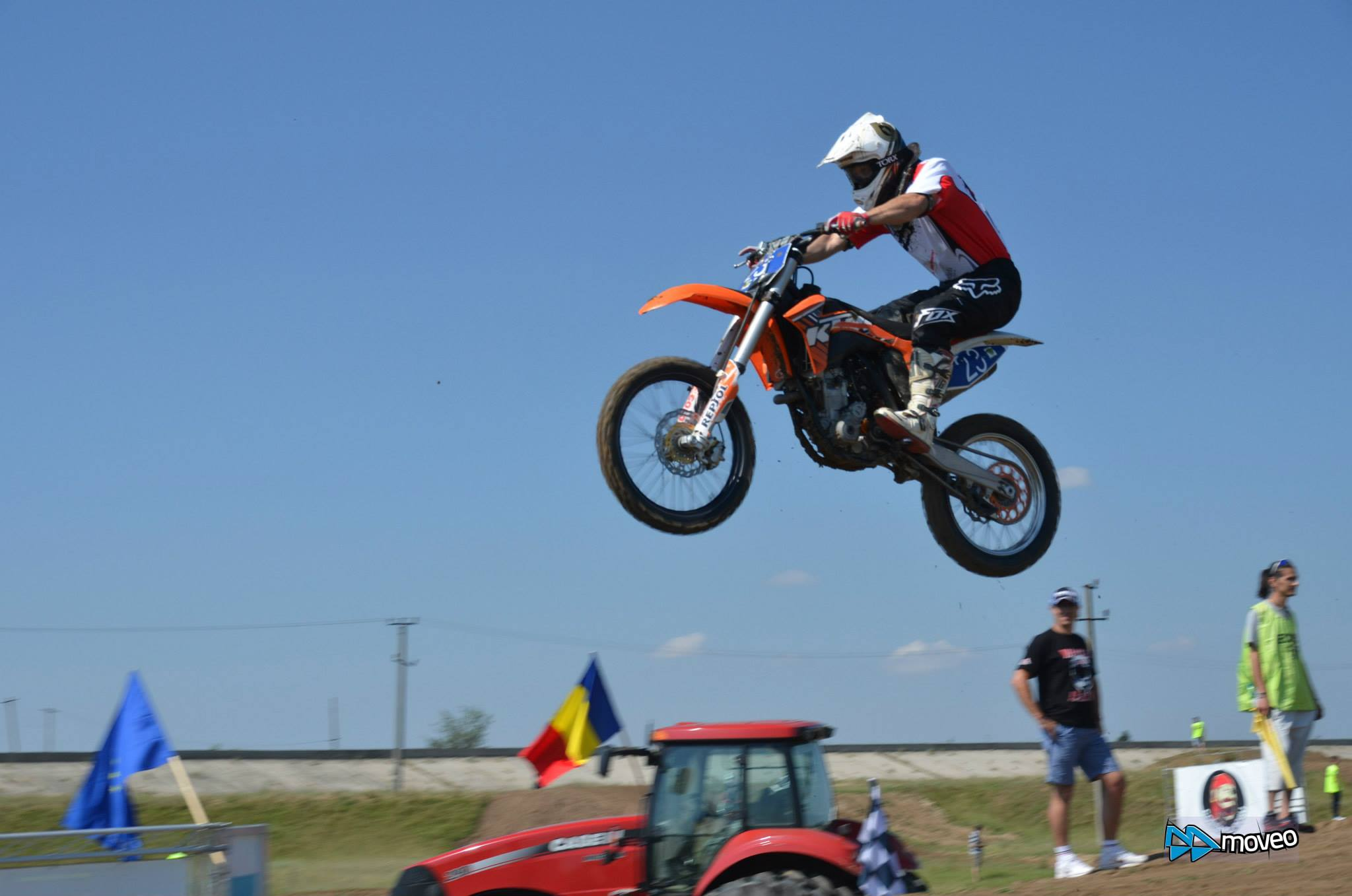 La Motocross Cup, Circuitul Corsarul Roșu